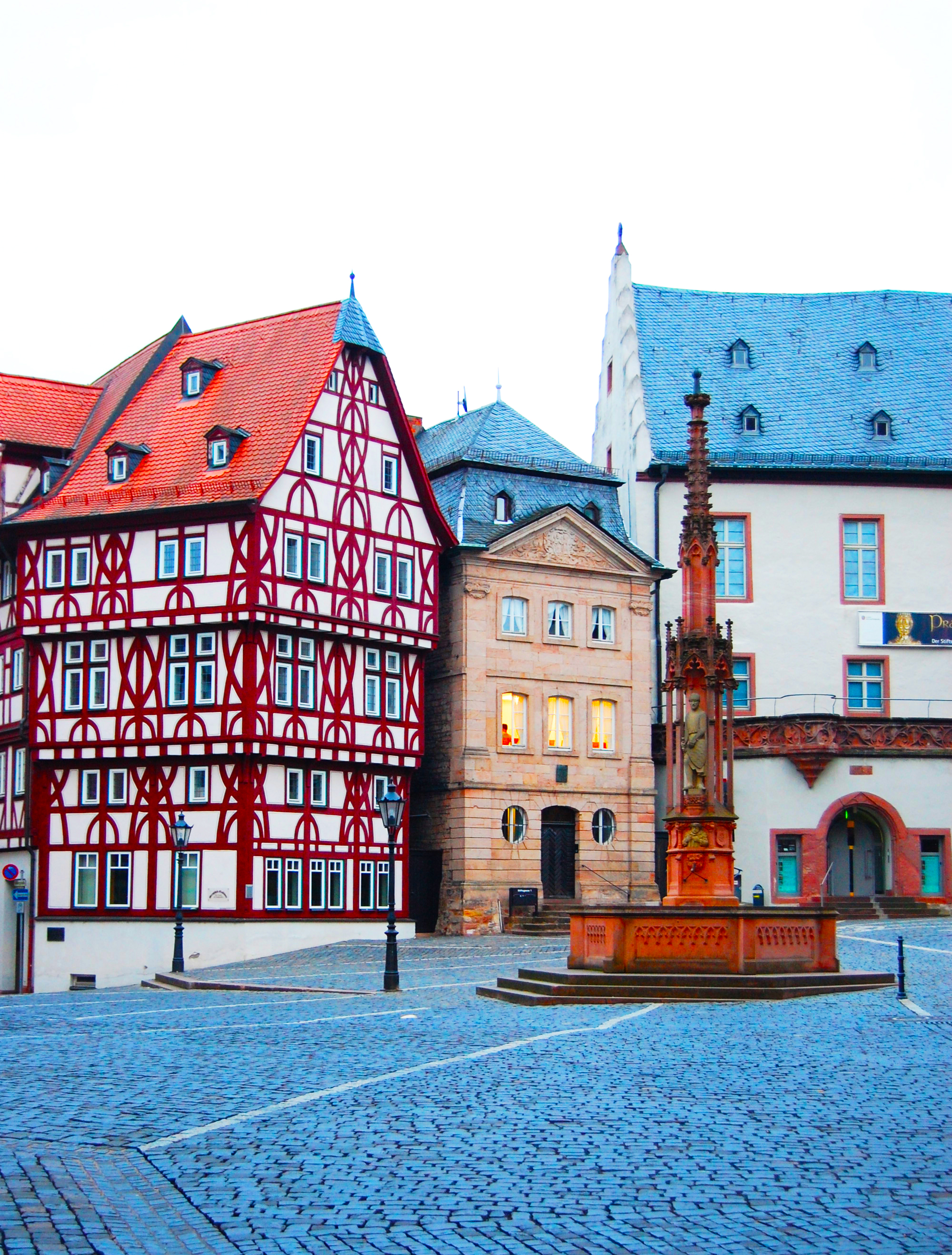 Löwenapotheke (links) am Stiftsplatz in Aschaffenburg